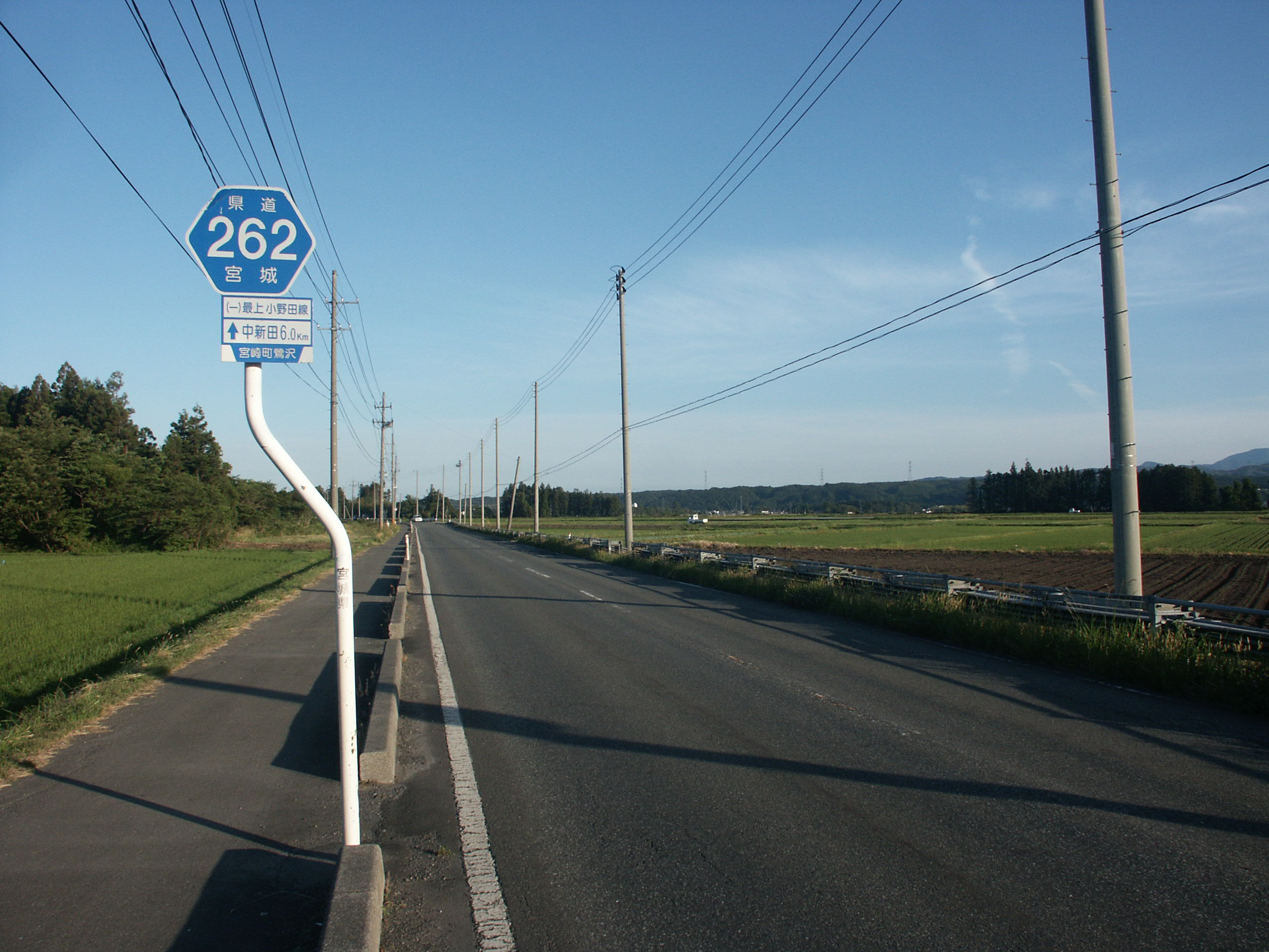 宮城県道262号線加美町鴬沢付近